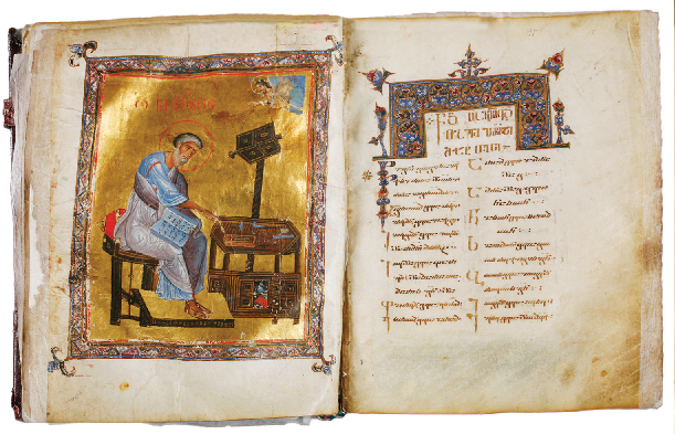 ალავერდის ოთხთავი